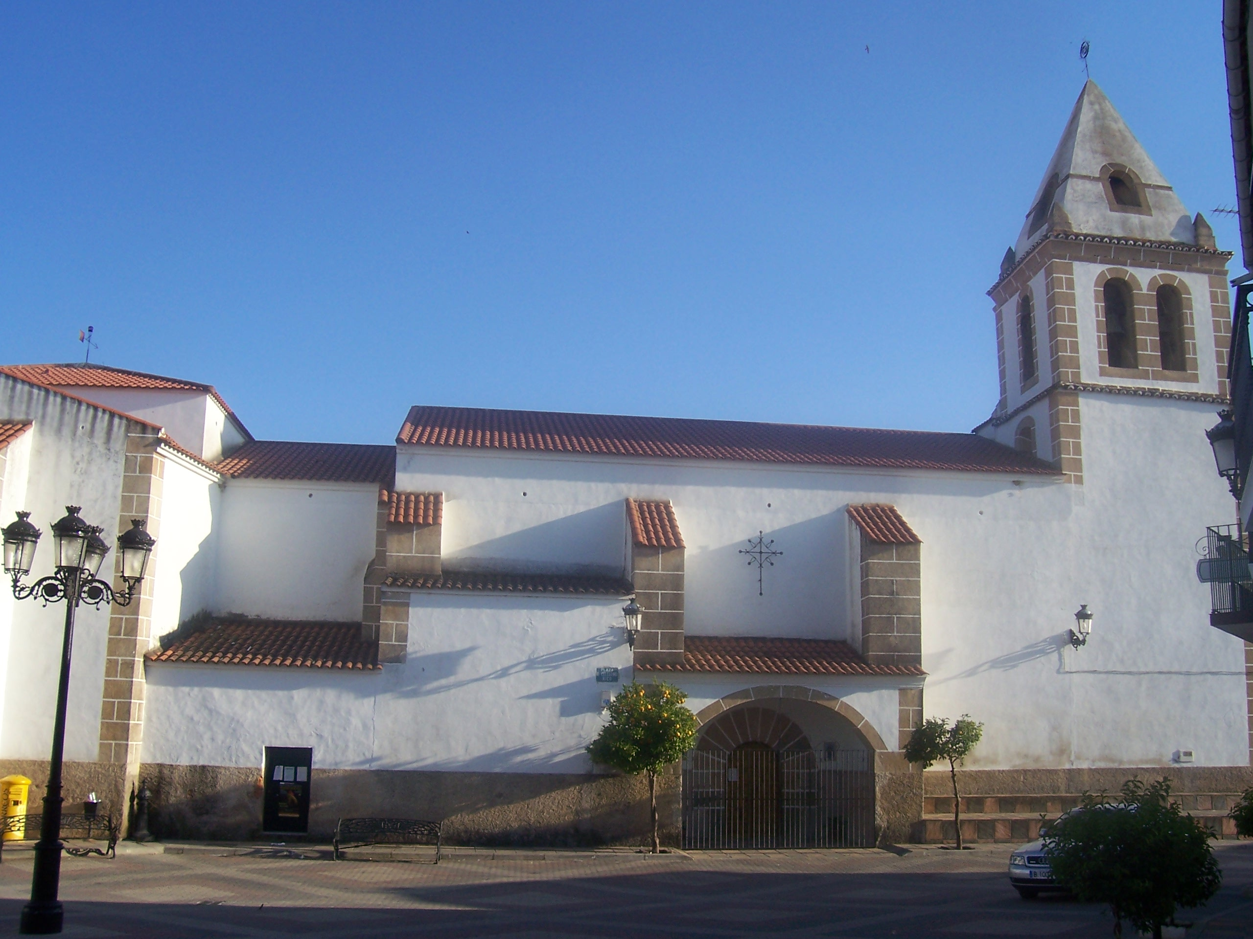 Iglesia en Membrío, provincia de Cáceres, España.